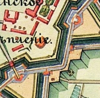 Брест-Литовск.